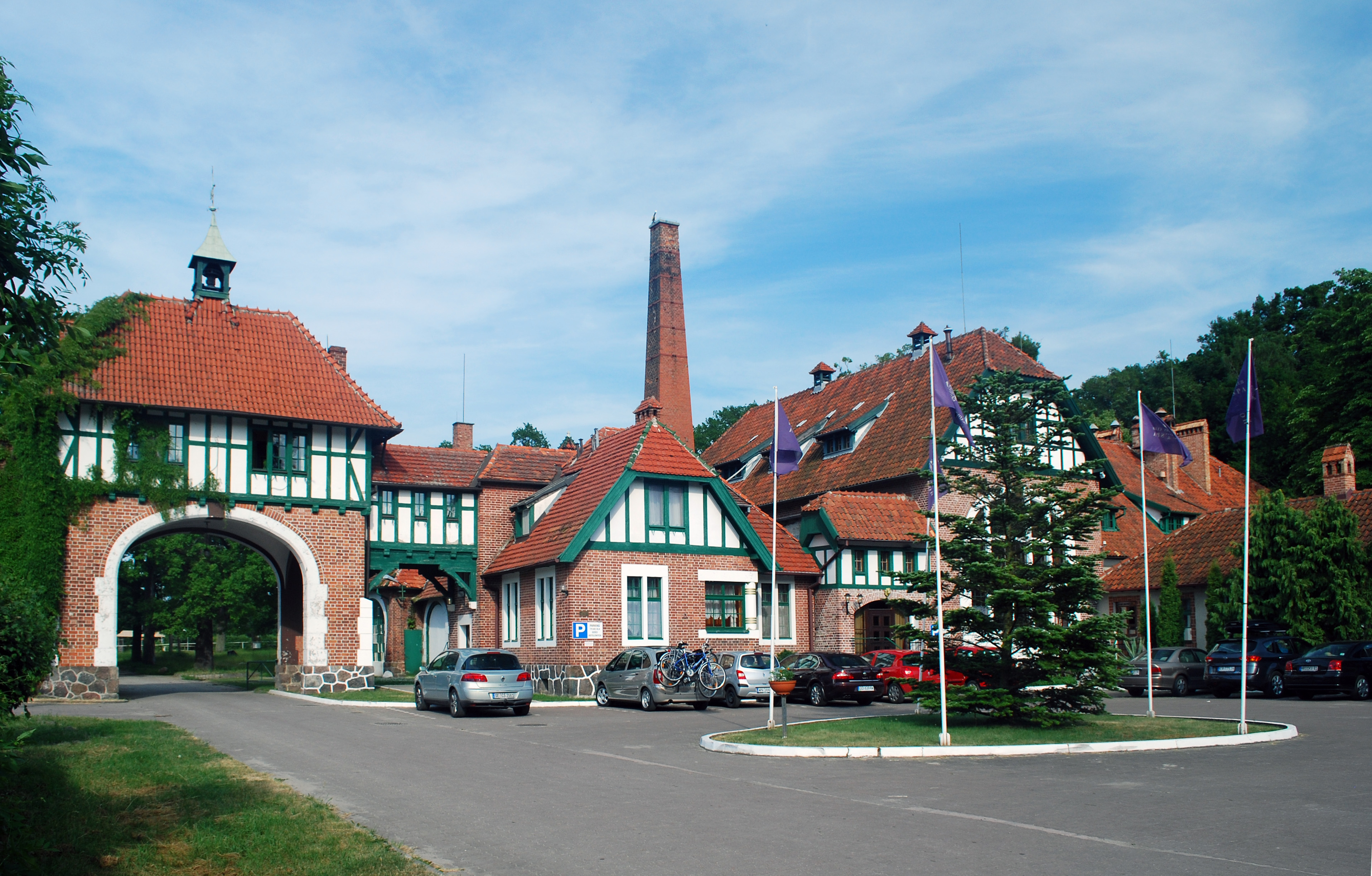 Dawne zakłady Birknera w Kadynach (obecnie hotel).